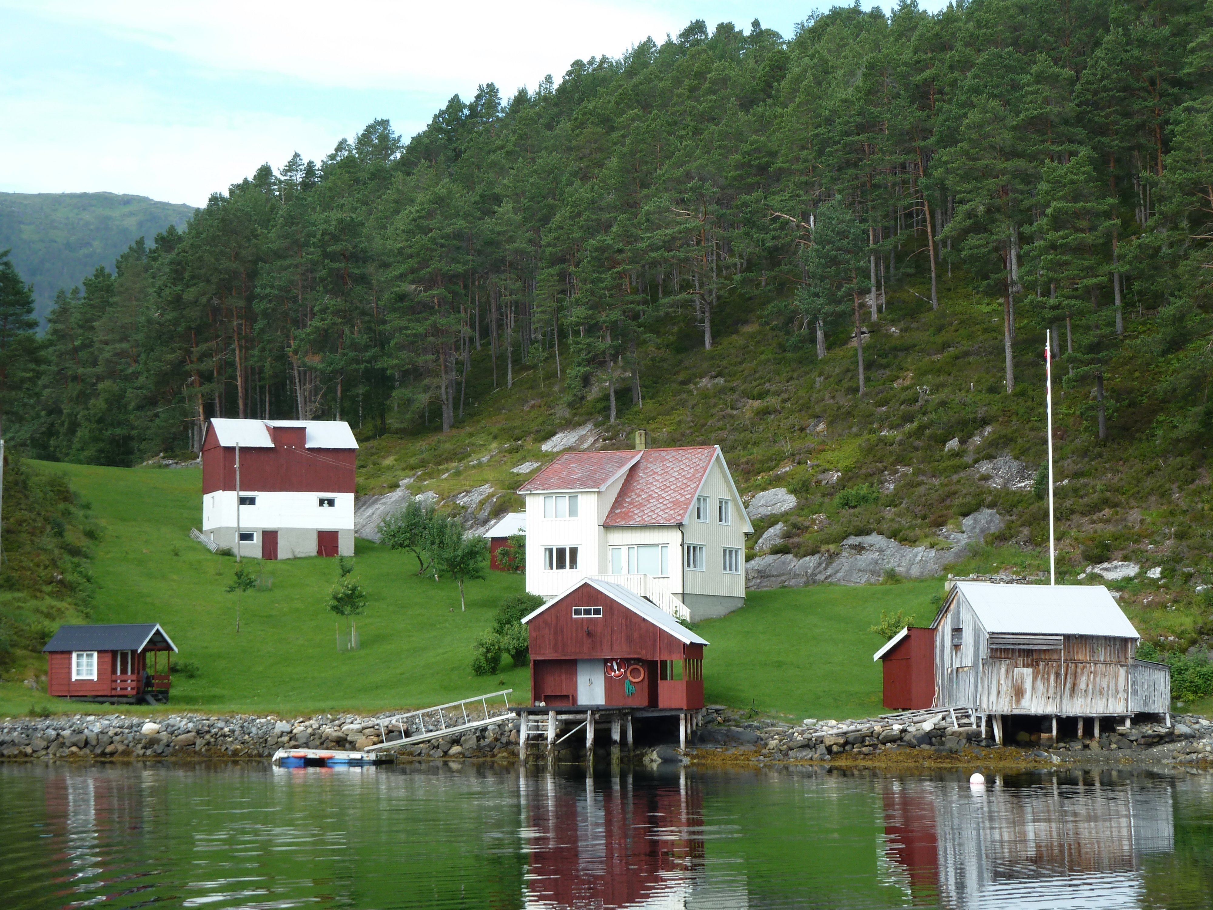 Kalvik on Rottøya island in Aure, Norway